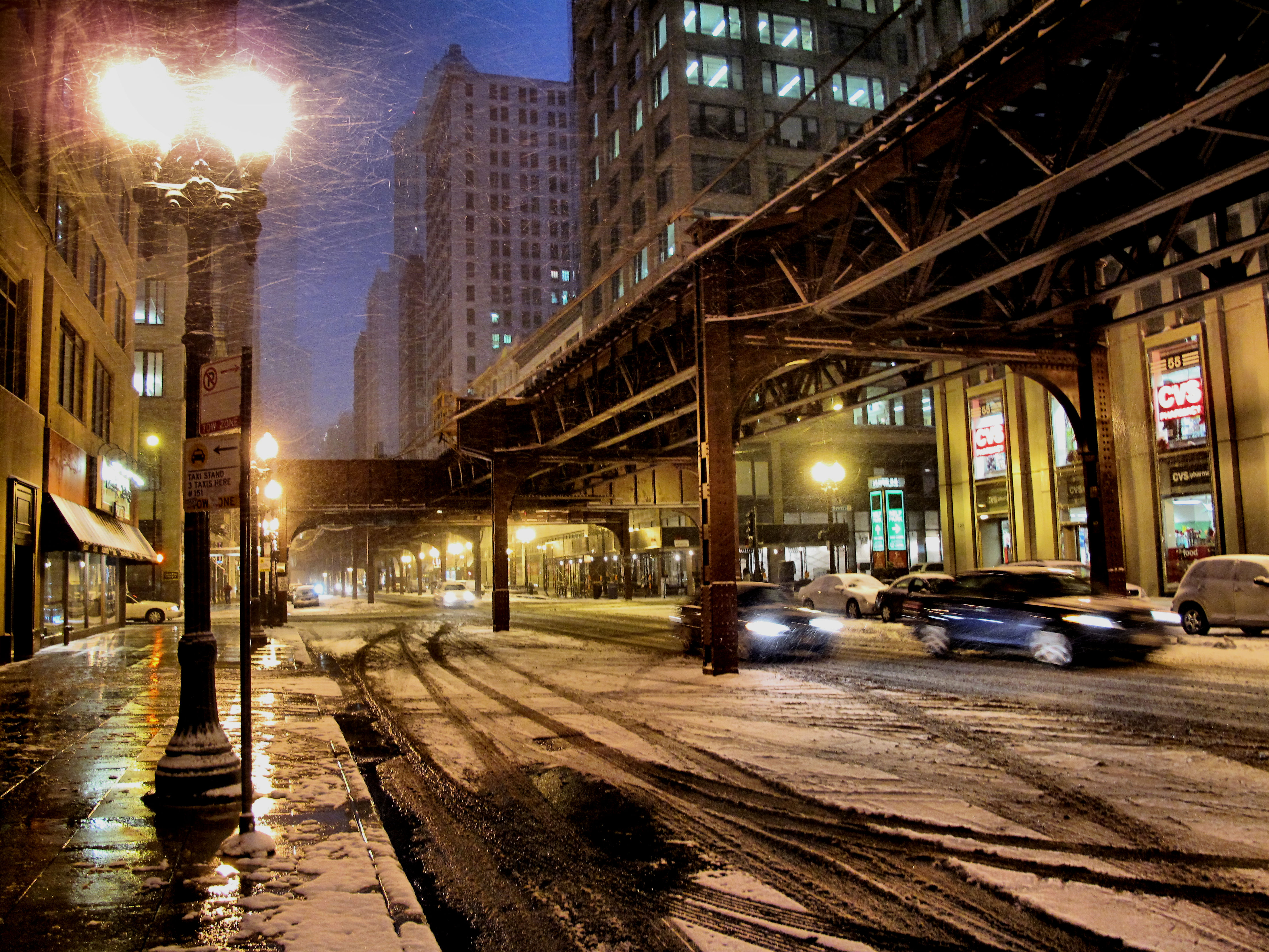 Blizzard